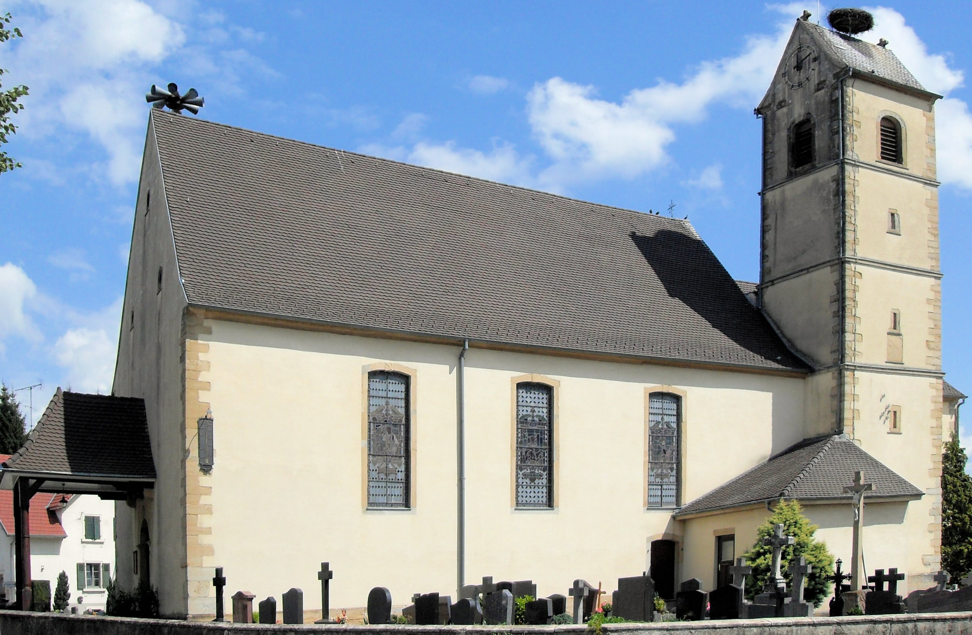 L'eglise Saint-Gall à Folgensbourg